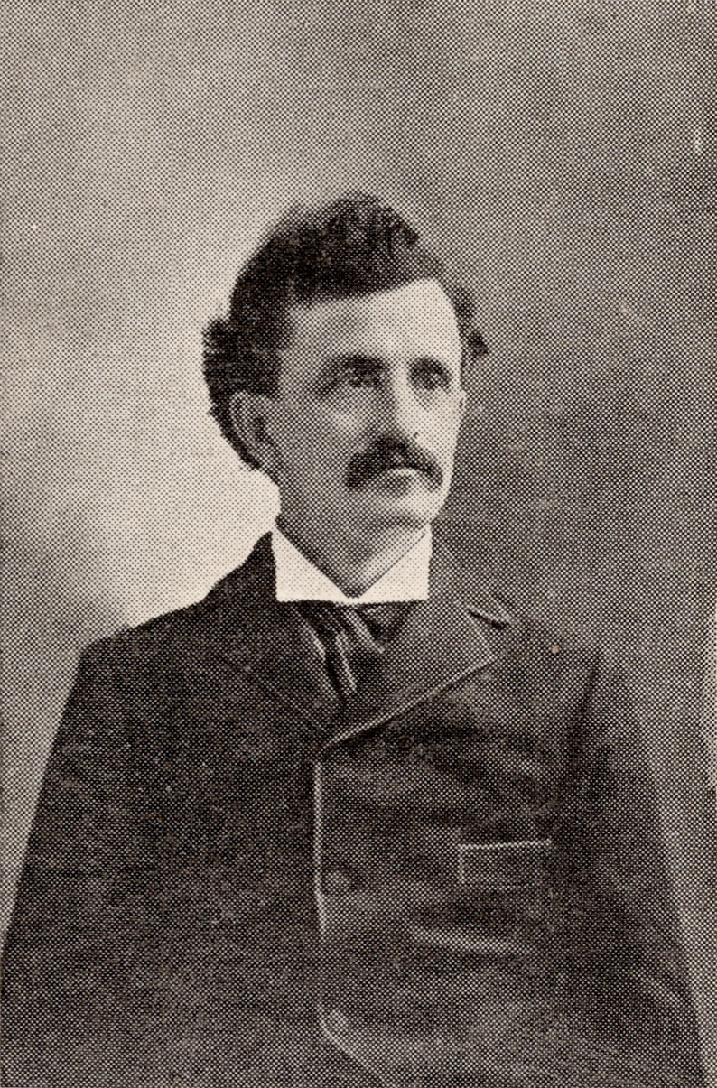 Information added by Wikimedia users.Édouard Bouffard, député de Montmorency